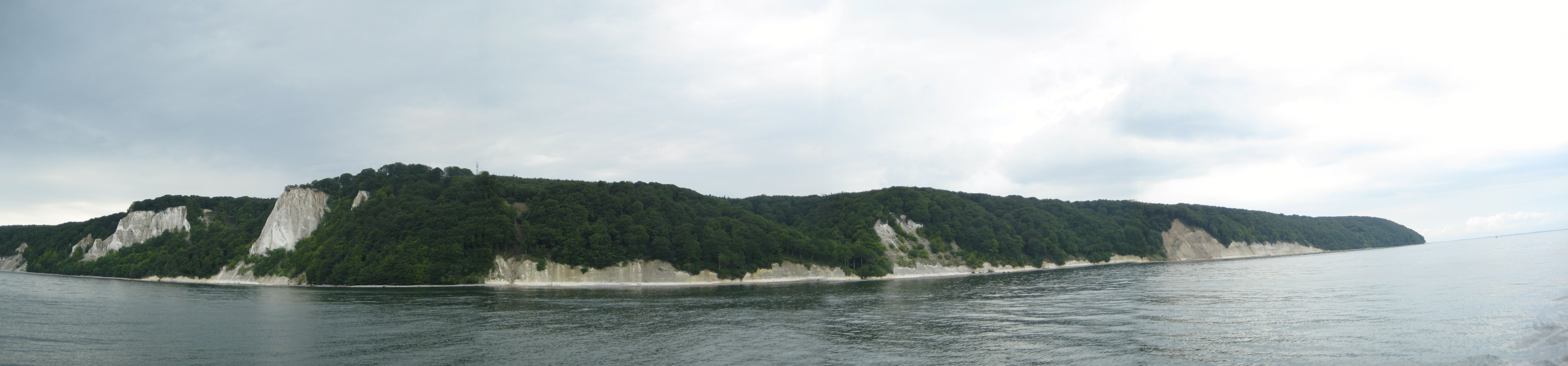 Panorama der Rügener Kreidefelsen, vom Boot aus fotografiert